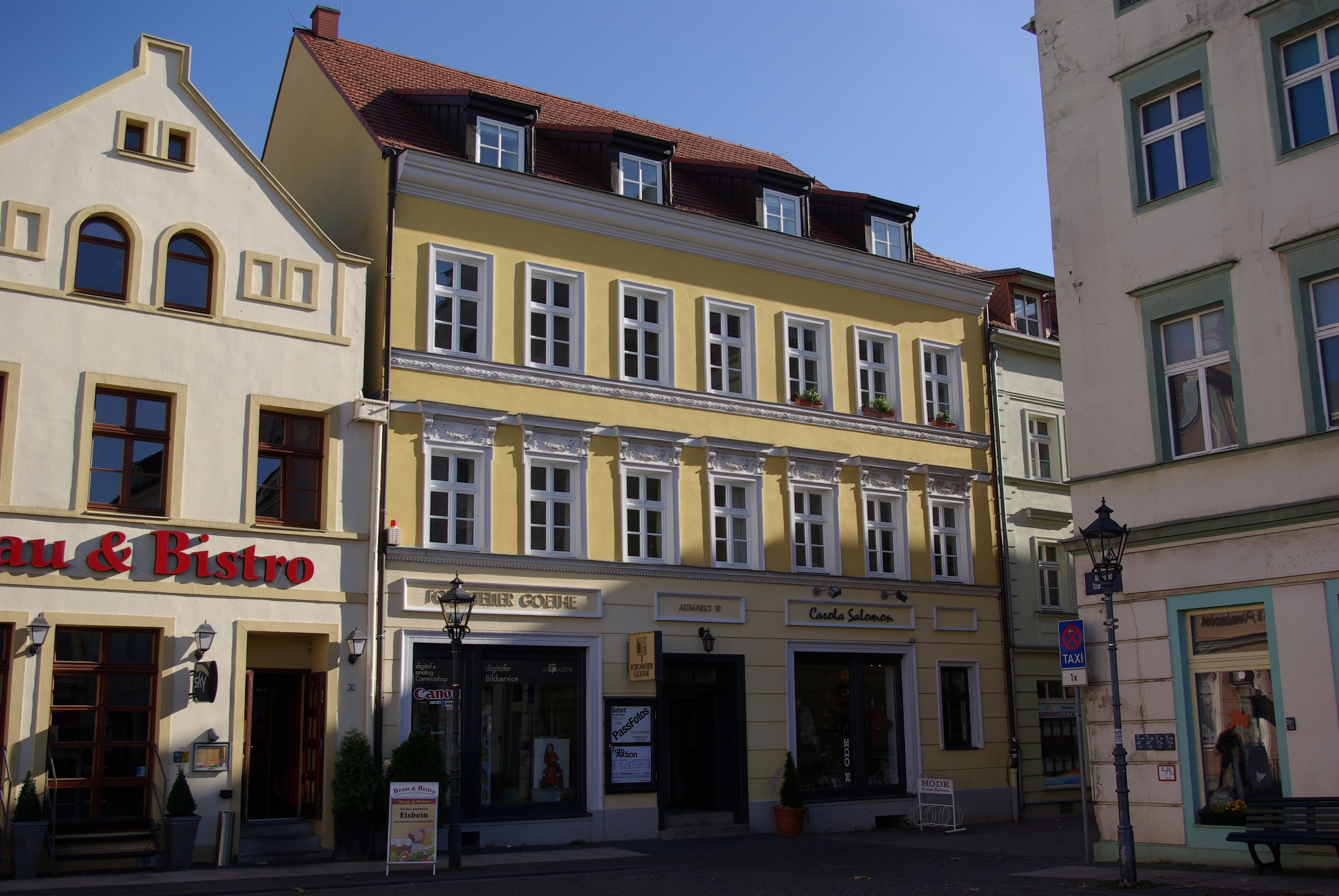 Cottbus in Brandenburg. Das Haus Altmarkt 19 steht unter Denkmalschutz.